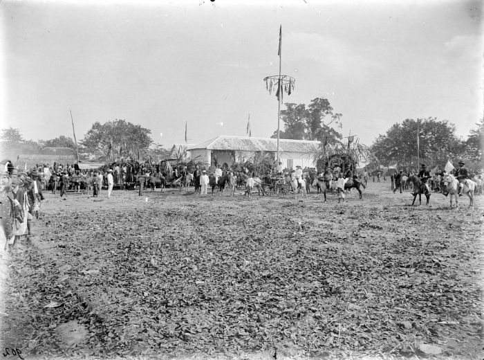 Negatief. Maalfeest op de suikerfabriek 'Kentjong' Kediri